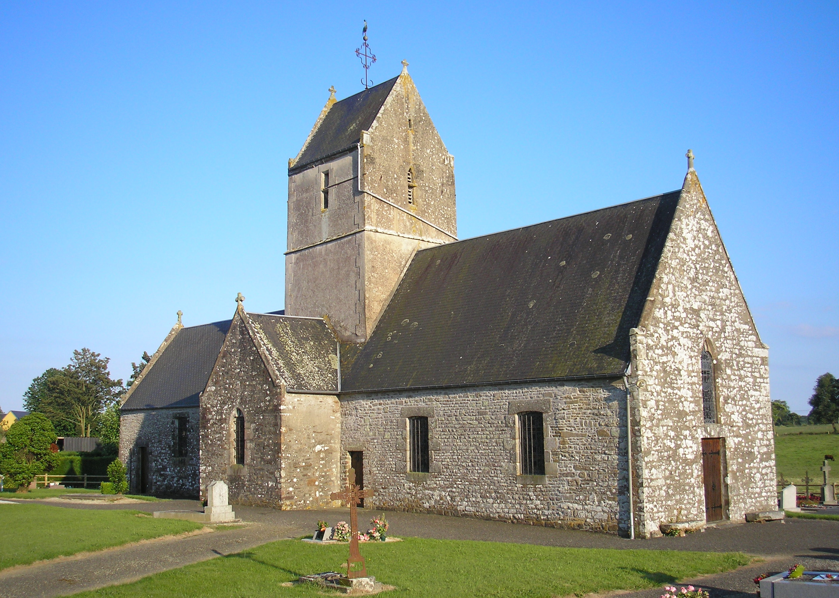 Folligny (Normandie, France). L'église Notre-Dame-de-l'Annonciation du Mesnil-Drey.